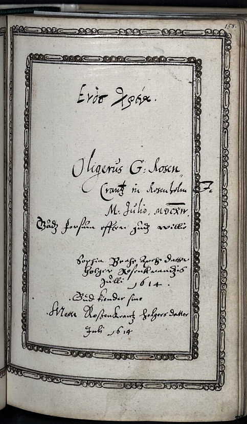 Eintrag von Holger Rosenkrantz, Sophie Rosenkrnatz geb. Brahe und Mette Rosenkrantz im Album amicorum von David von Mandelsloh, Juli 1614